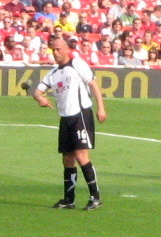 Claus Jensen